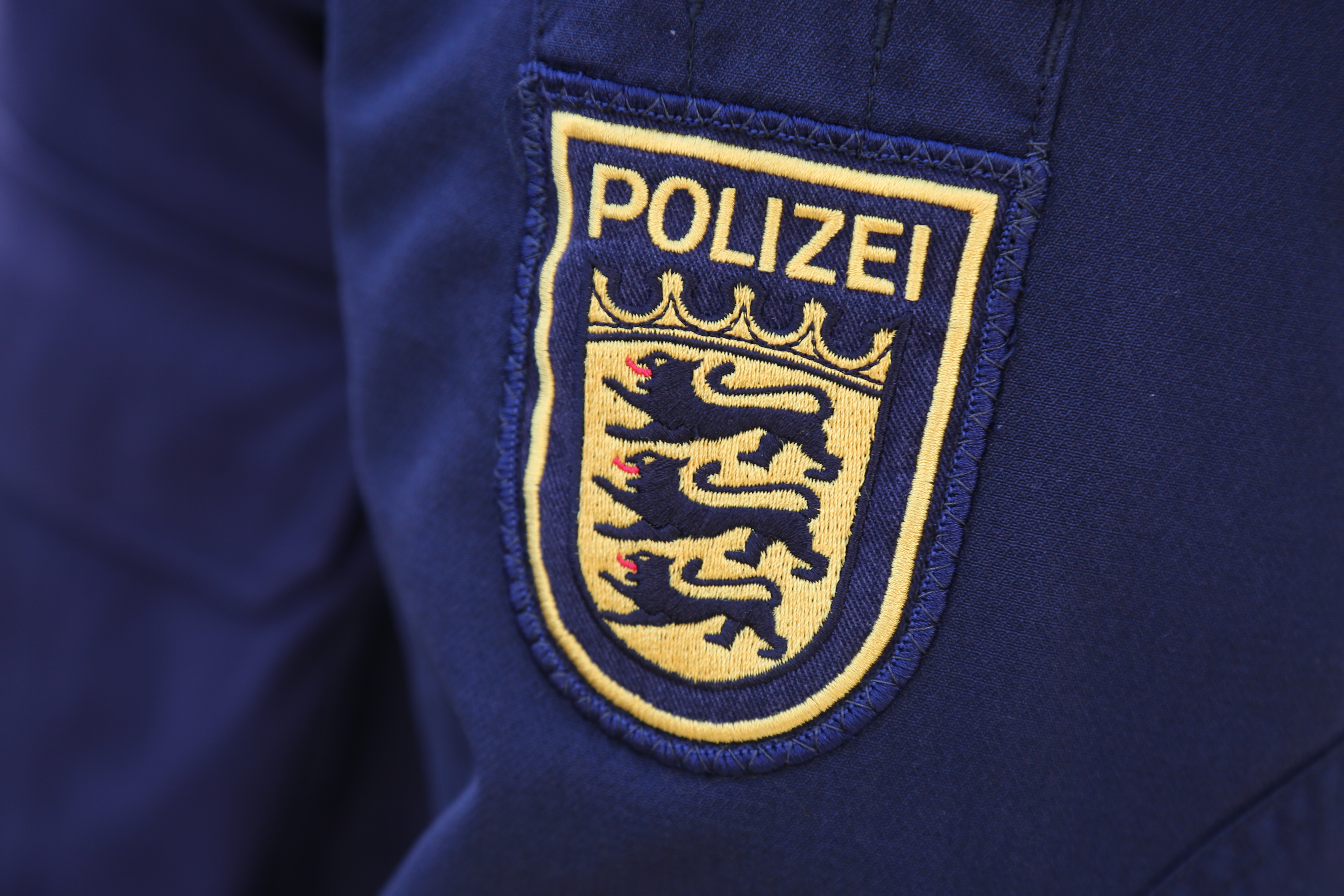 Ärmelwappen der Polizei Baden-Württemberg